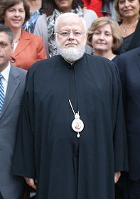 Από τις 15-26 Σεπτεμβρίου 2012, ο Υφυπουργός Εξωτερικών Κωνσταντίνος Τσιάρας πραγματοποιεί επίσκεψη στις ΗΠΑ. Στις 15-18 Σεπτεμβρίου ο κ. Υφυπουργός μετέβη στον Άγιο Φραγκίσκο και το Λος Άντζελες όπου επισκέφθηκε Πανεπιστημιακά ιδρύματα και συναντήθηκε με κυβερνητικούς και εκκλησιαστικούς παράγοντες καθώς και τα Προεδρεία Ομογενειακών Οργανώσεων. Εν συνεχεία, από την Τετάρτη 19 Σεπτεμβρίου ο κ. Υφυπουργός συνοδεύει τον Υπουργό Εξωτερικών Δημήτρη Αβραμόπουλο στις επαφές που θα πραγματοποιήσει στο Σικάγο, Βοστώνη και Νέα Υόρκη.